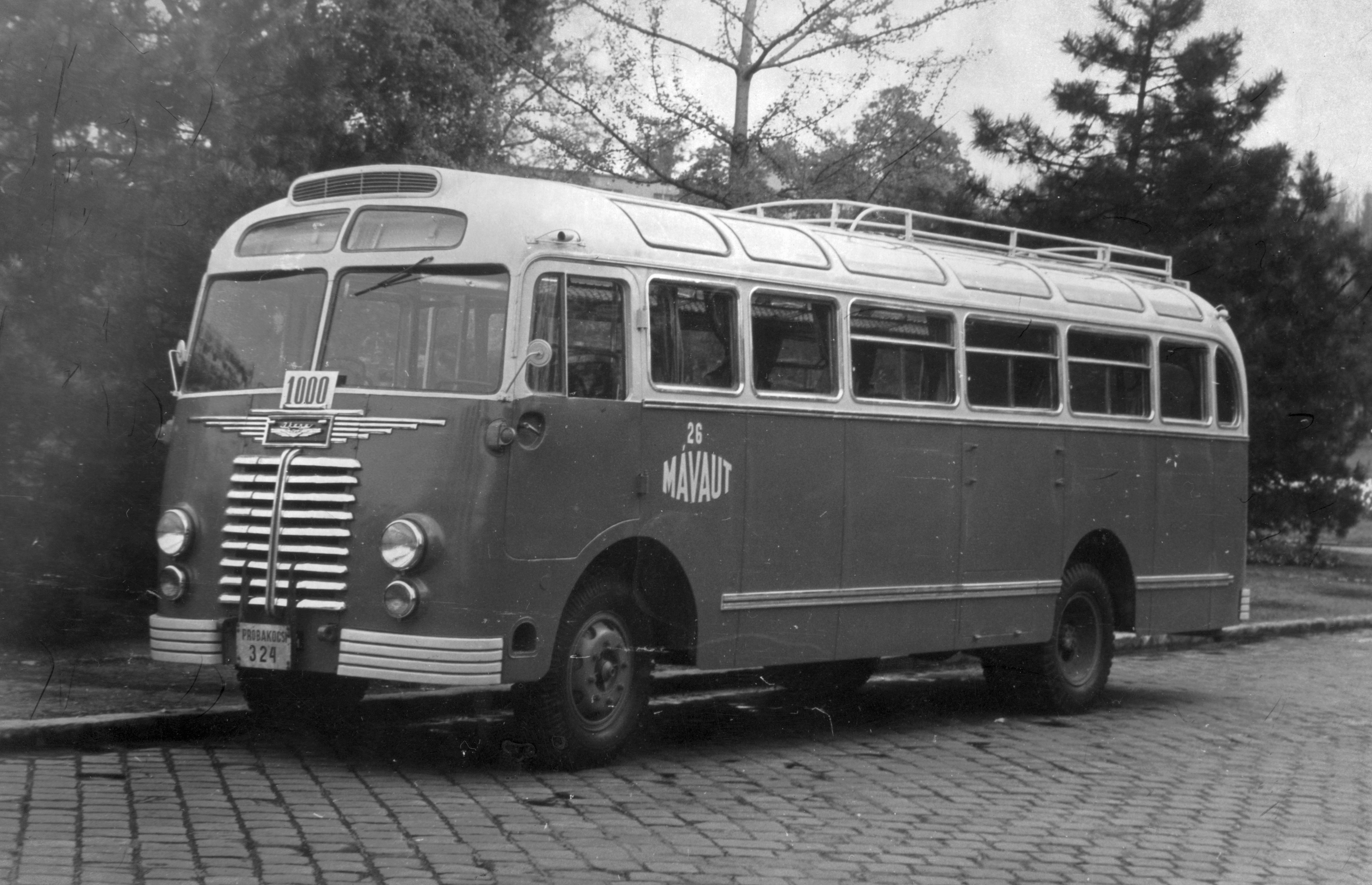 Ikarus IK30 autóbusz, az ezredik. Location: Hungary Tags: transport, vehicle, bus, Hungarian brand, Ikarus-brand, MÁVAUT-organisation Title: Ikarus IK30 autóbusz, az ezredik.